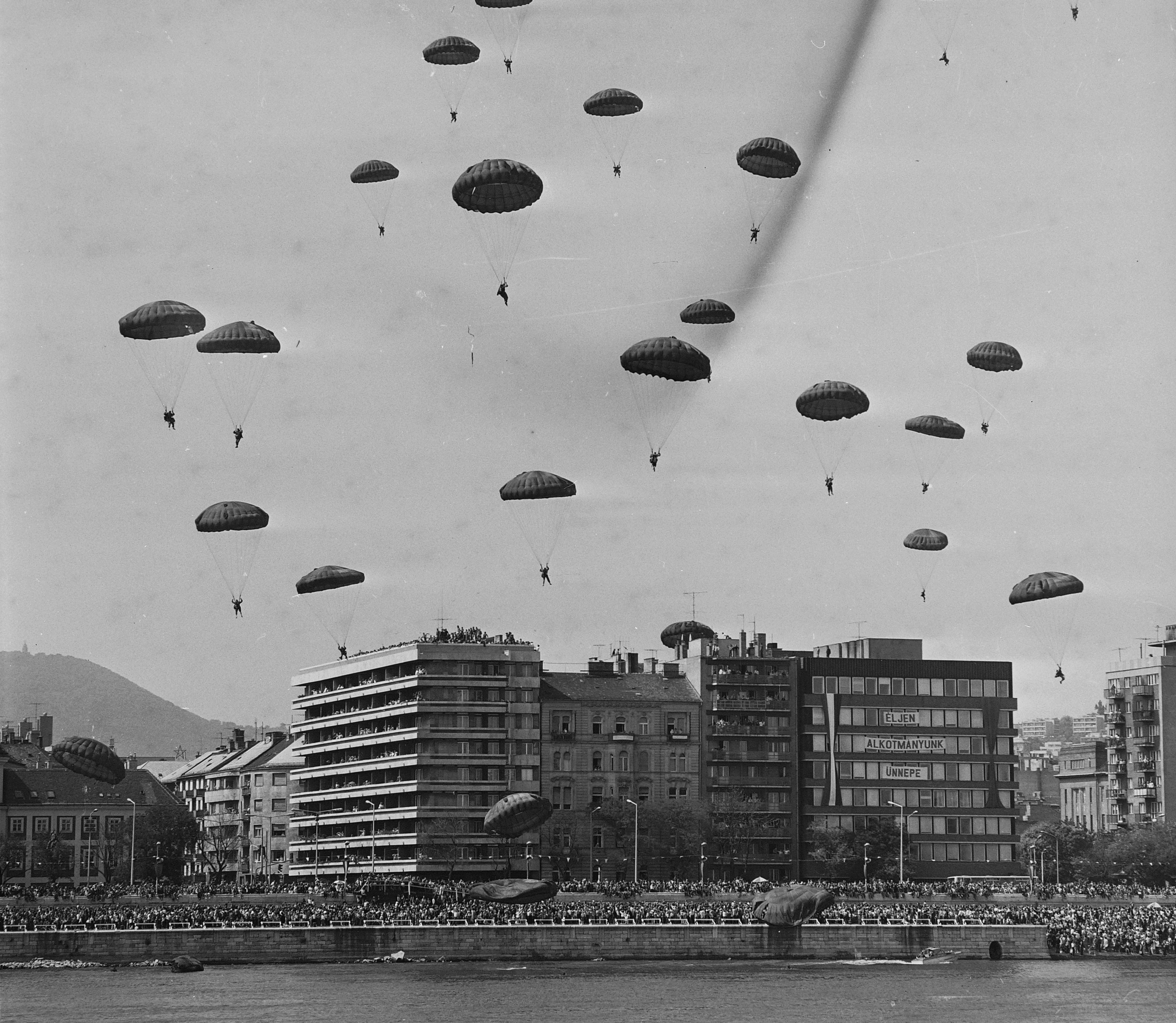 Bem rakpart, a Csalogány utca torkolatától, augusztus 20-i légiparádé. Location: Hungary, Budapest II. Tags: Budapest Title: Bem rakpart, a Csalogány utca torkolatától, augusztus 20-i légiparádé.